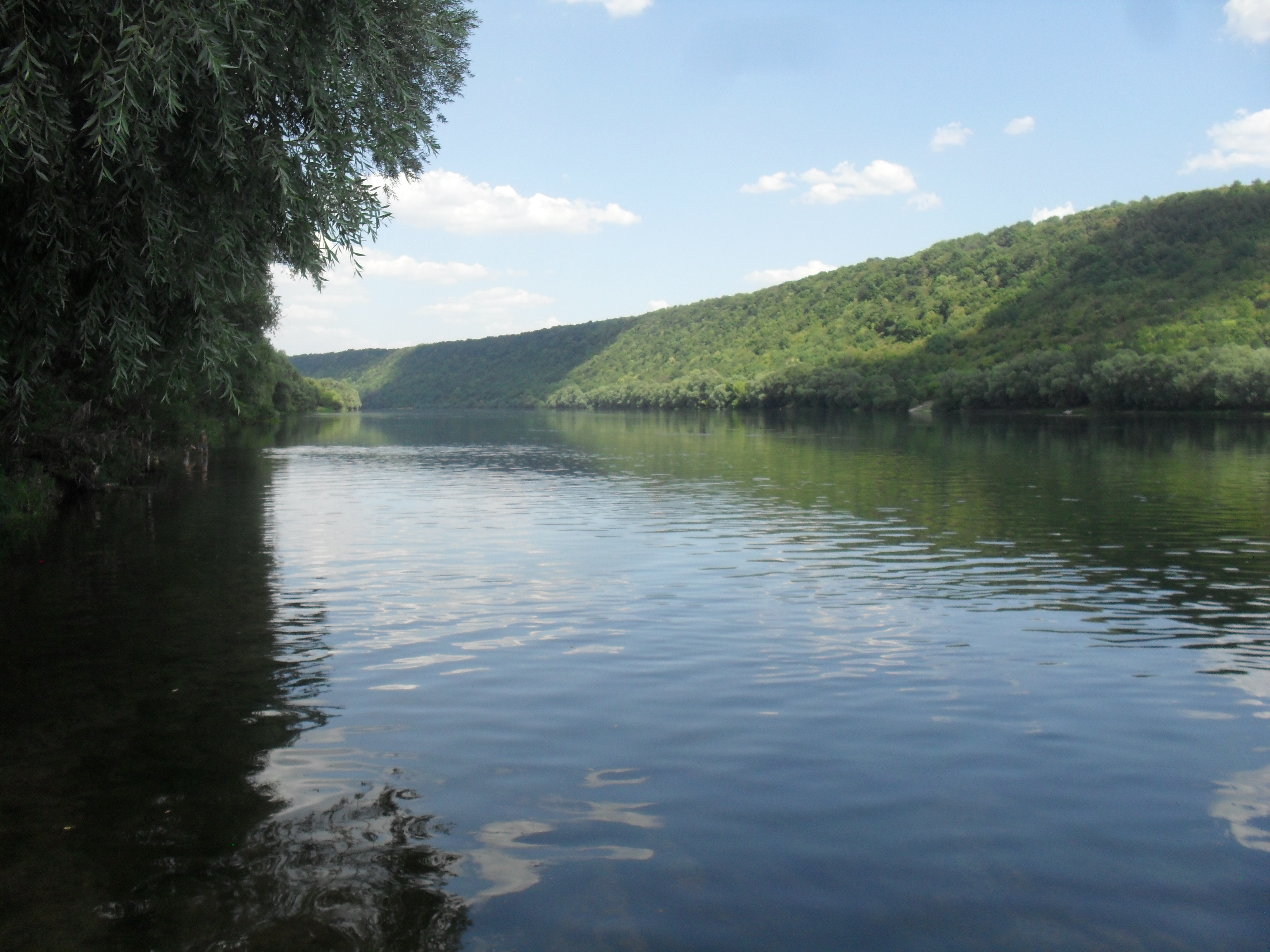 Річка Дністер в районі кварталу Нові Сороки (м. Сороки)